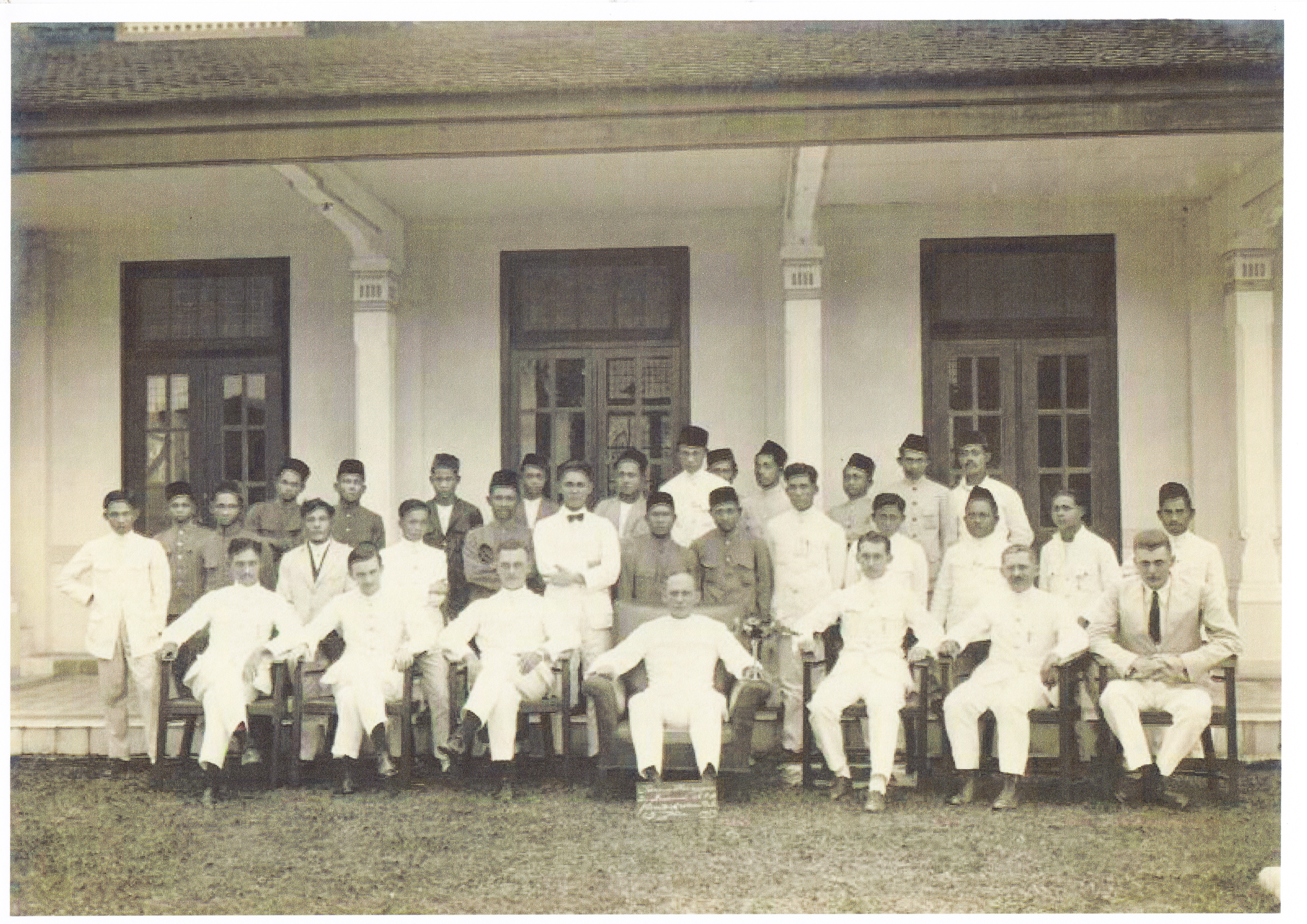 Karyawan pertama PPKS bersama direktur Bram Rutgers